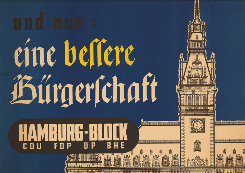 und nun: eine bessere Bürgerschaft Hamburg-Block CDU FDP DP BHE Abbildung: Hamburger Rathaus (Grafik) Plakatart: Motiv-/Textplakat Künstler_Grafiker: Gestaltung: Sator Werbeverlag, Hamburg Auftraggeber: Hamburg-Block, Hamburg Drucker_Druckart_Druckort: Offsetdruck: Emil Falke, Hamburg Objekt-Signatur: 10-006 : 105 Bestand: Plakate zu Bürgerschaftswahlen Hamburg (10-006) GliederungBestand10-18: Plakate zu Bürgerschaftswahlen Hamburg (10-006) » Hamburg-Block (CDU-FDP-DP-BHE) Lizenz: KAS/ACDP 10-006 : 105 CC-BY-SA 3.0 DE